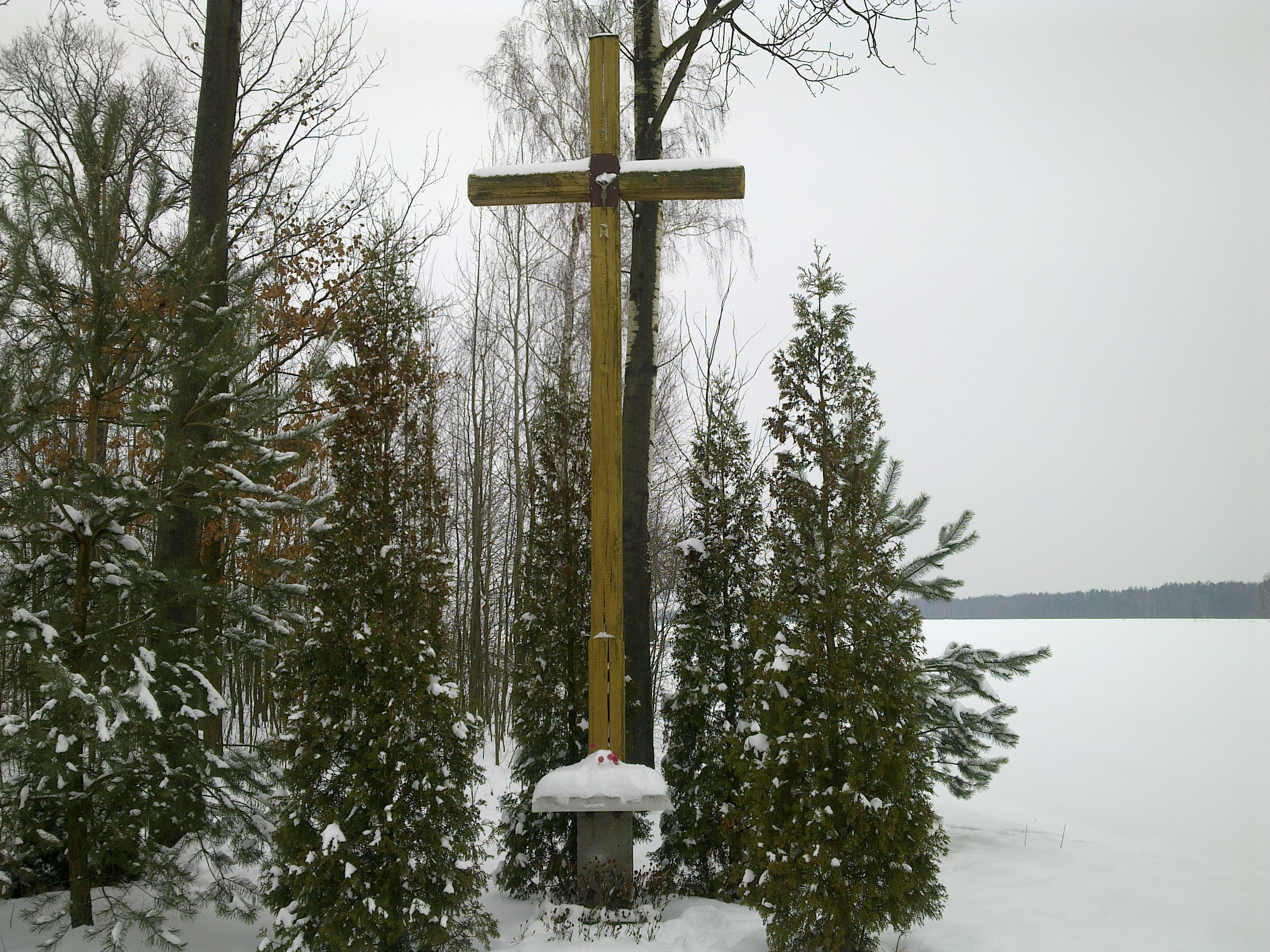 Krzyż postawiony przez W Bergera w Świdnie